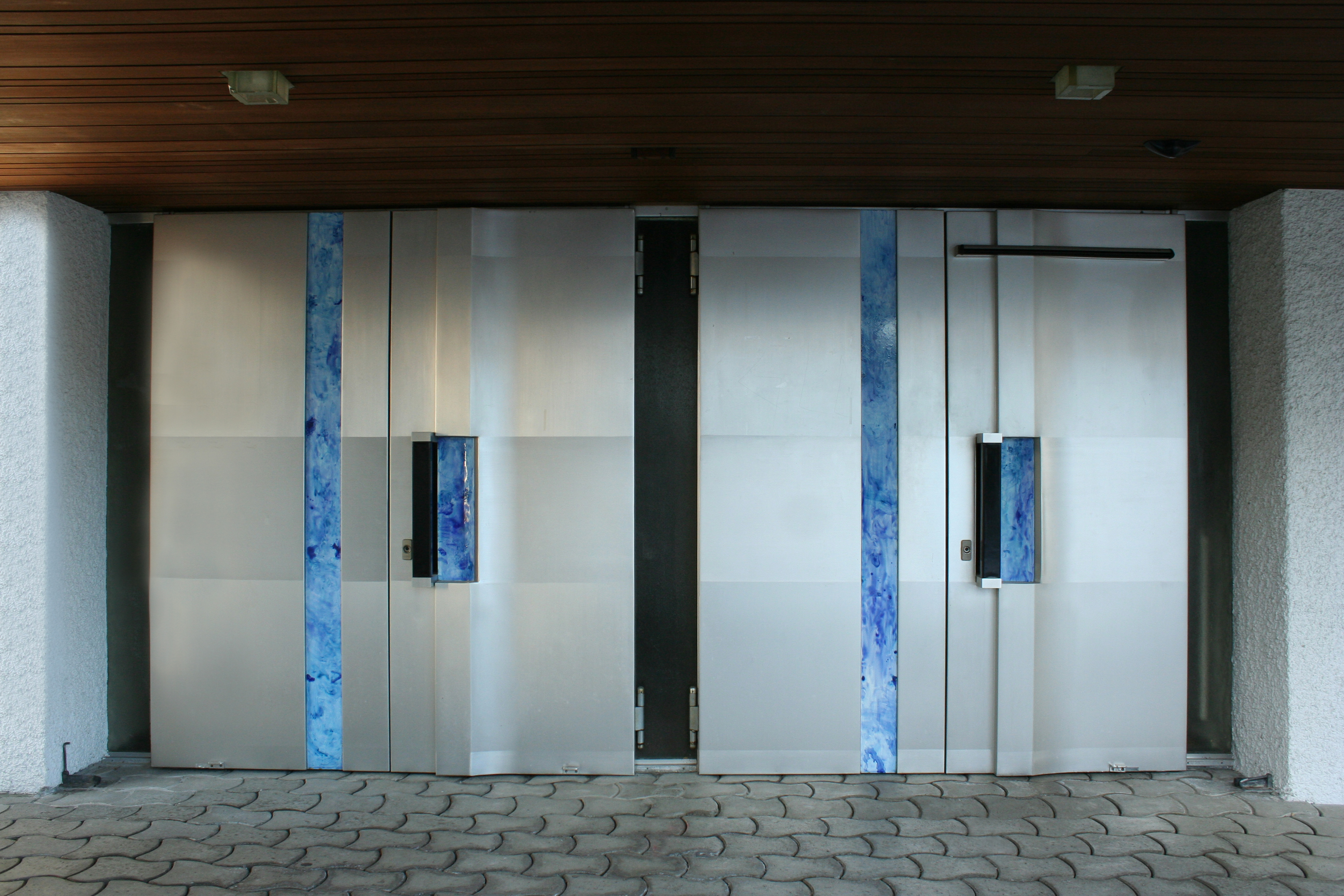 Römisch-katholische Pfarrkirche St. Michael Zollikerberg, Kirchenportal